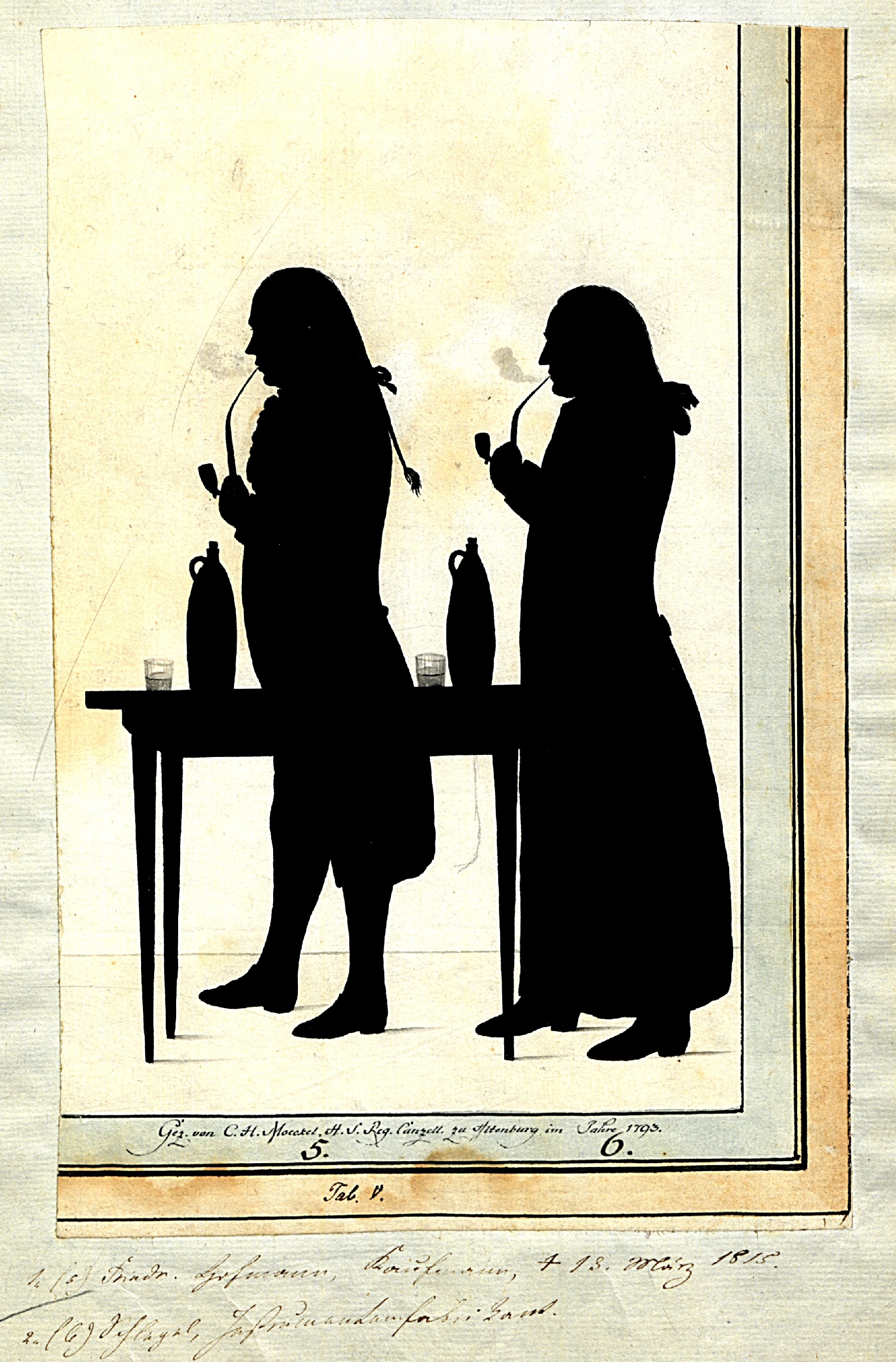 Elias Schlegel (1750-1805), im Bild rechts, Instrumentenmacher aus Altenburg, Silhouettenmalerei von C.H. Moeckel, H.S. Reg.-Canzell. zu Altenburg, 1793, Thüringisches Staatsarchiv Altenburg, Bildersammlung GAGO, Nr. 469; im Bild links: der Altenburger Kaufmann Friedr. Hofmann († 1815)